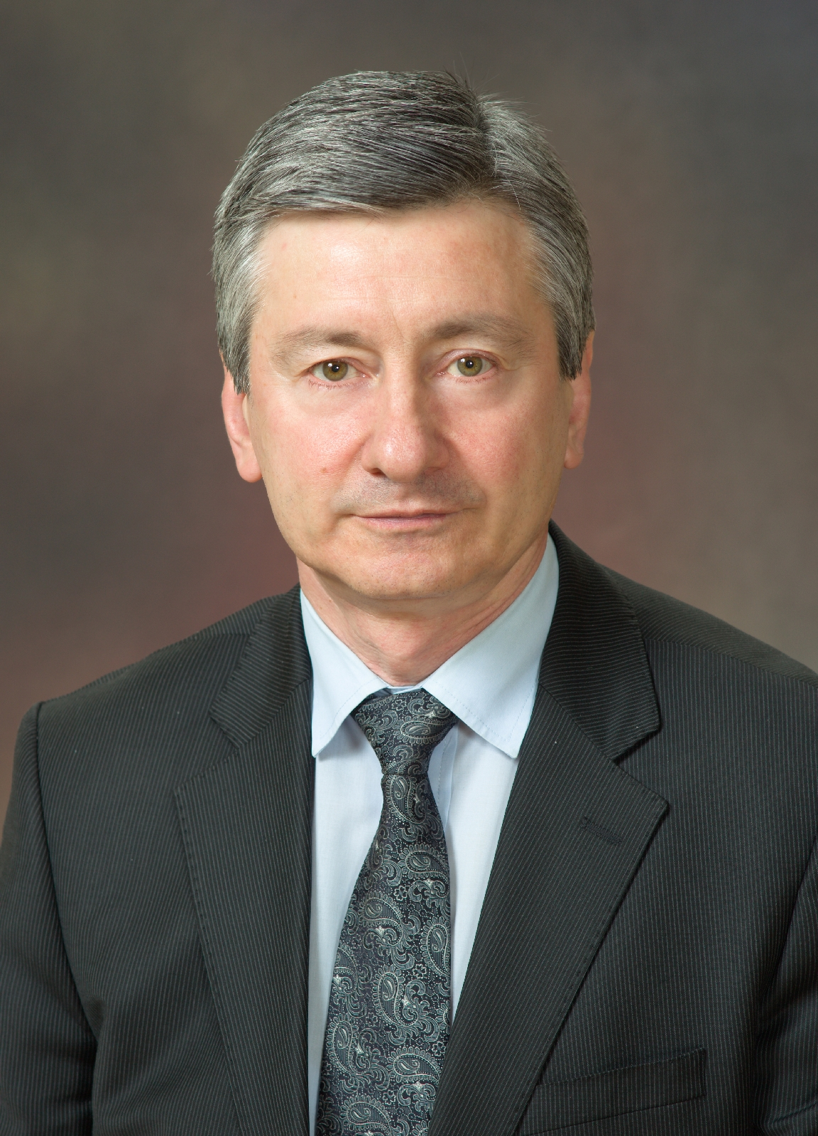 Народный артист РФ Овчинников Владимир Павлович